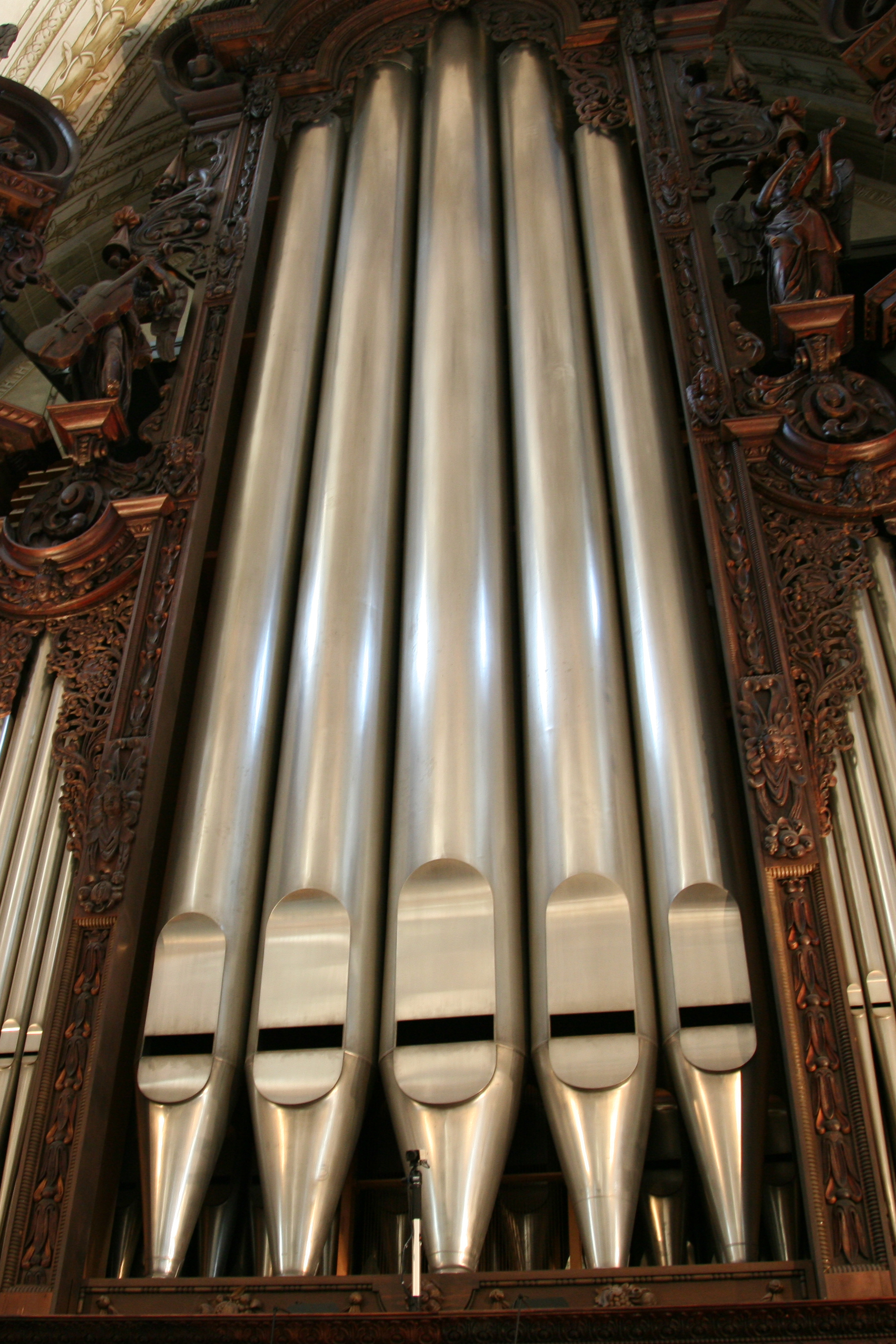 Hofkirche, grosse Pfeifen der Hoforgel